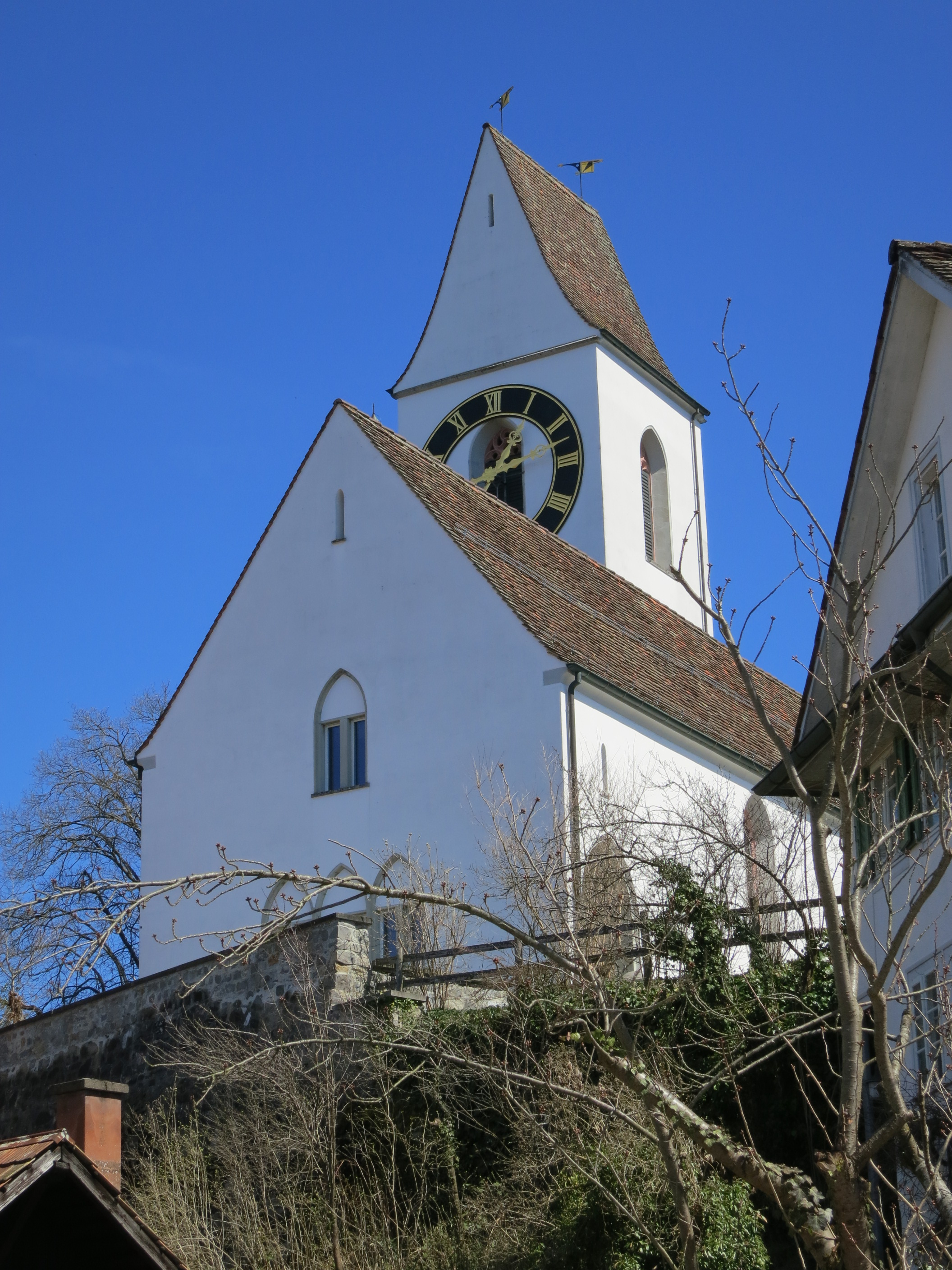 Kirche, Hedingen ZH, Schweiz